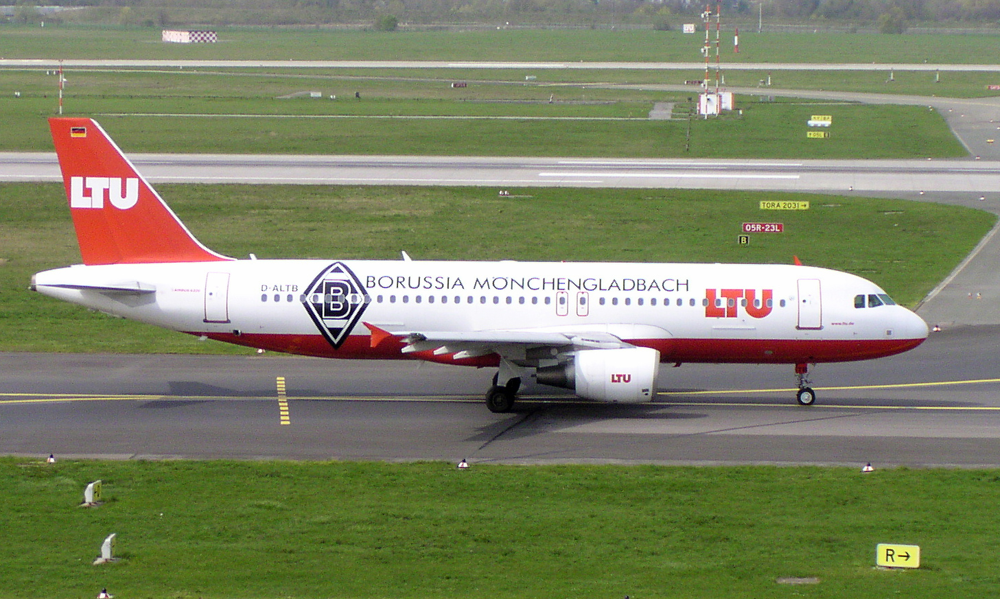 LTU Airbus A320-200 Borussia Mönchengladbach D-ALTB in Düsseldorf (EDDL)